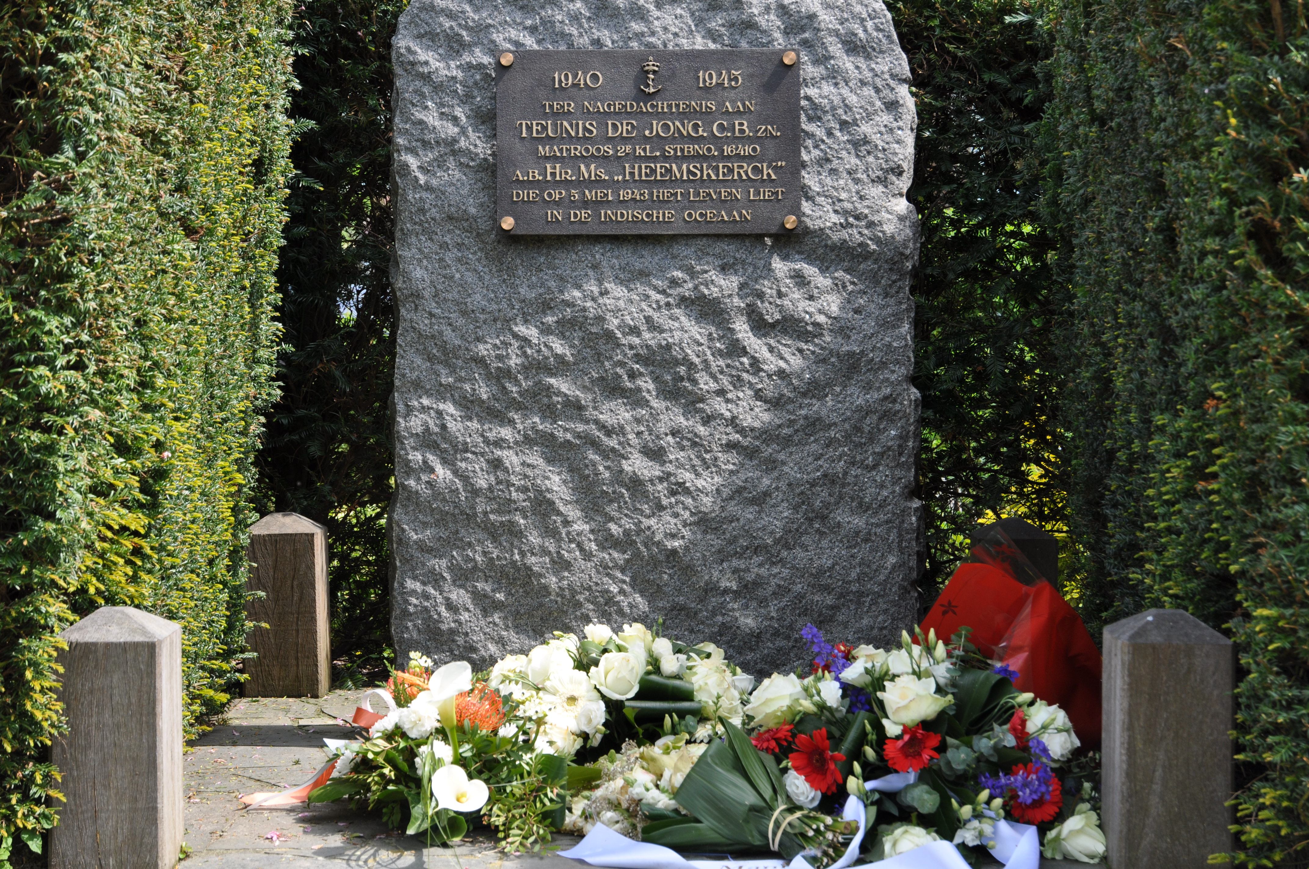 Herdenkingsmonument Teunis de Jong, Linschoten.